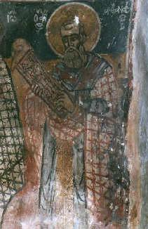 Олтарна фреска во црквата „Св. Никола“ во охридското село Трпејца.